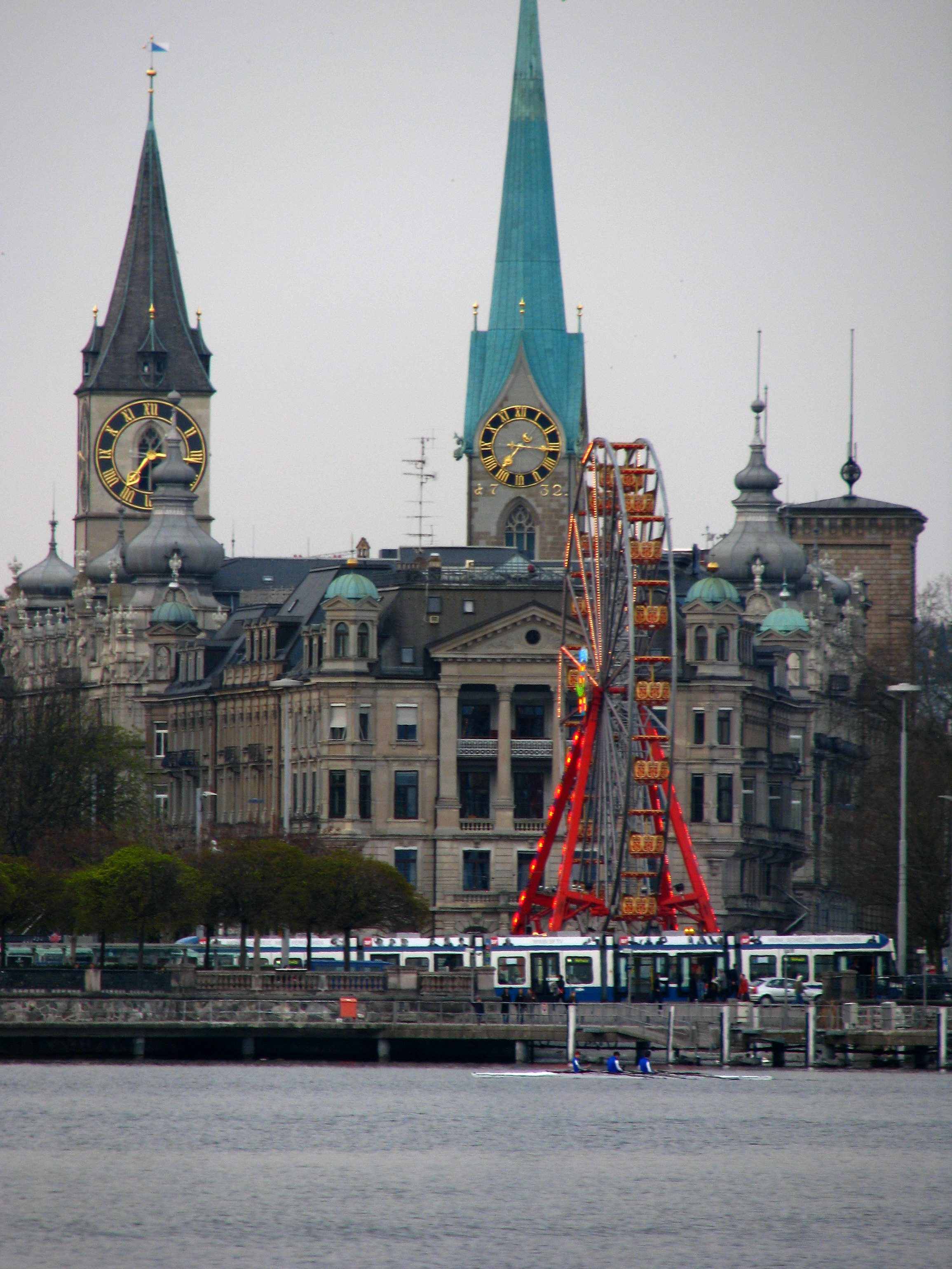 Bürkliplatz in Zürich and ZSG landing gate, St. Peter (left) and Fraumünster church towers in the background.